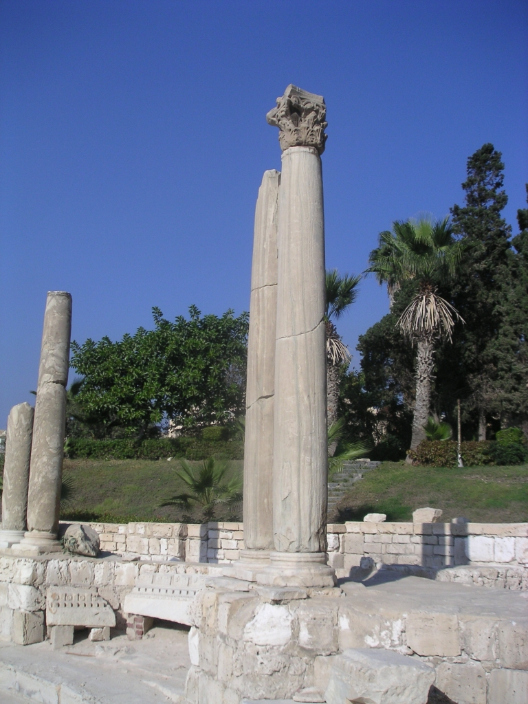 Colonnade en marbre vert du théâtre de Kom el-Dik à Alexandrie